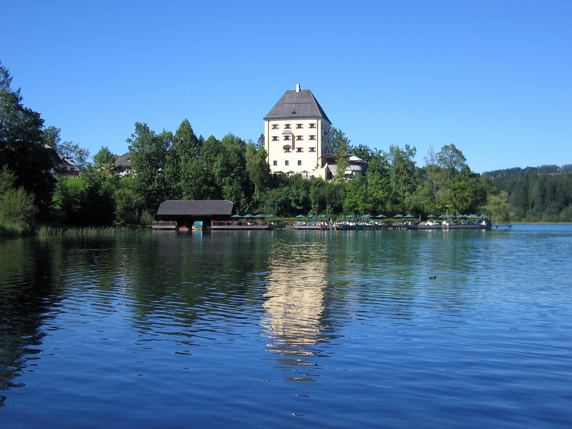 Schloss Fuschl - Fuschlsee - Bundesland Salzburg - Österreich